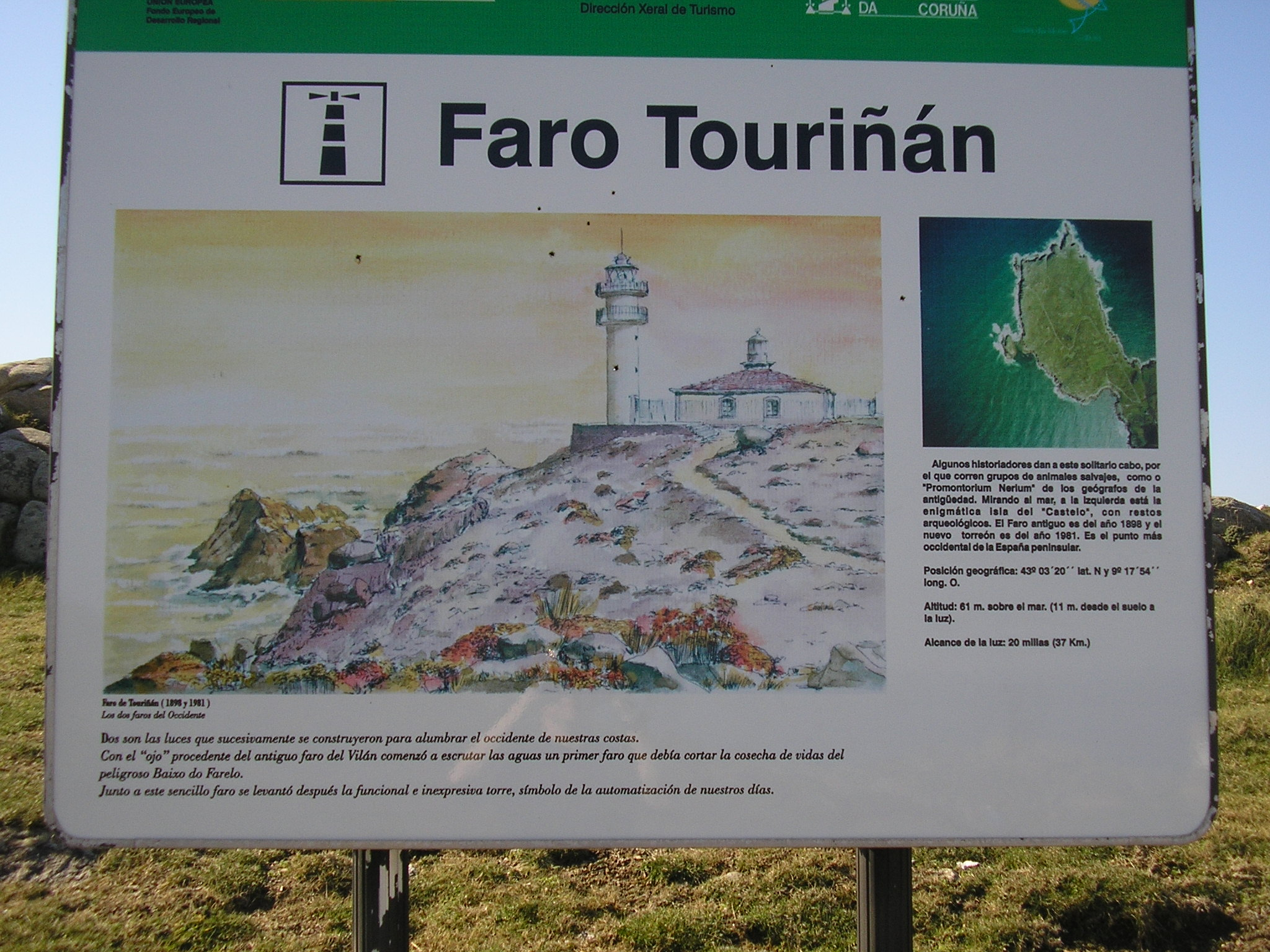 Infotafel am Leuchtturm des Cabo Touriñán (Costa de la Muerte, Spanien)